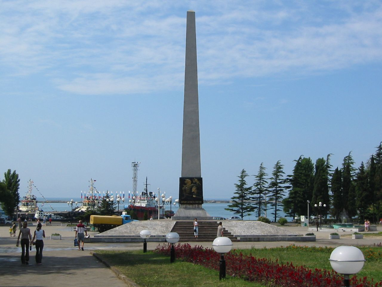 Tuapse